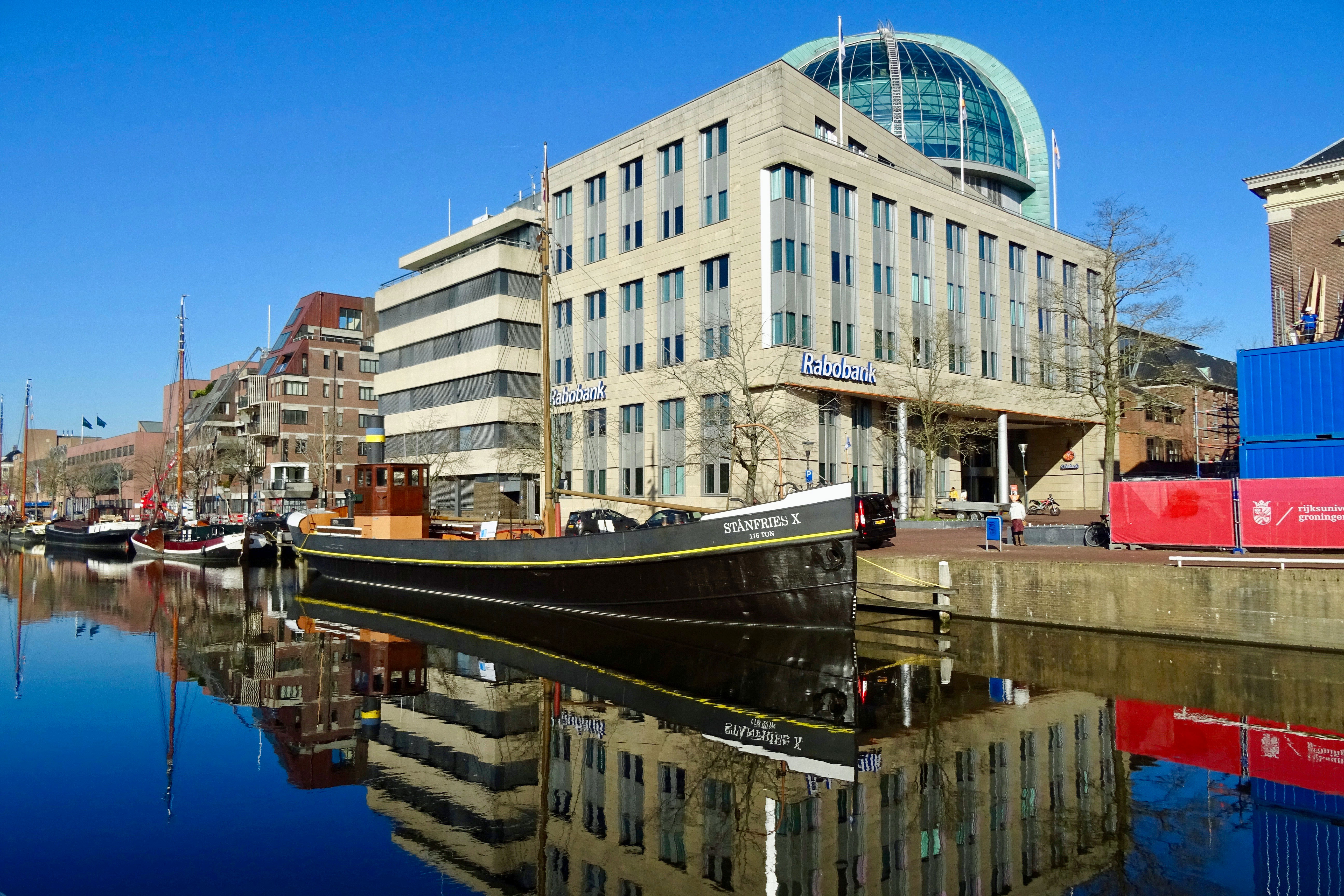 Willemskade met zicht op de Stânfries X en de Rabobank in Leeuwarden